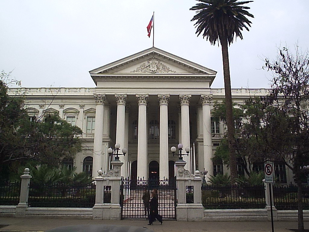 Edificio del Ex Congreso Nacional en Santiago de Chile